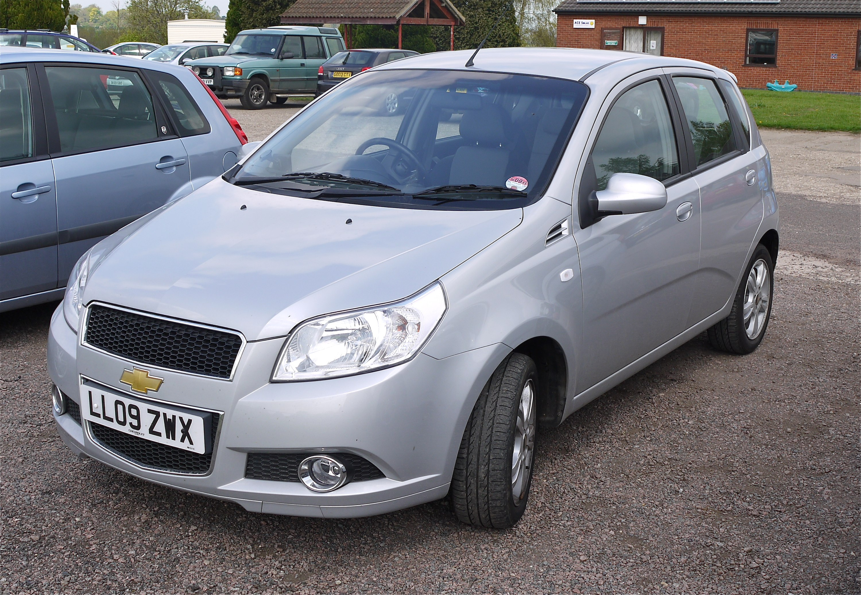 Panasonic G1 14-45 Lens